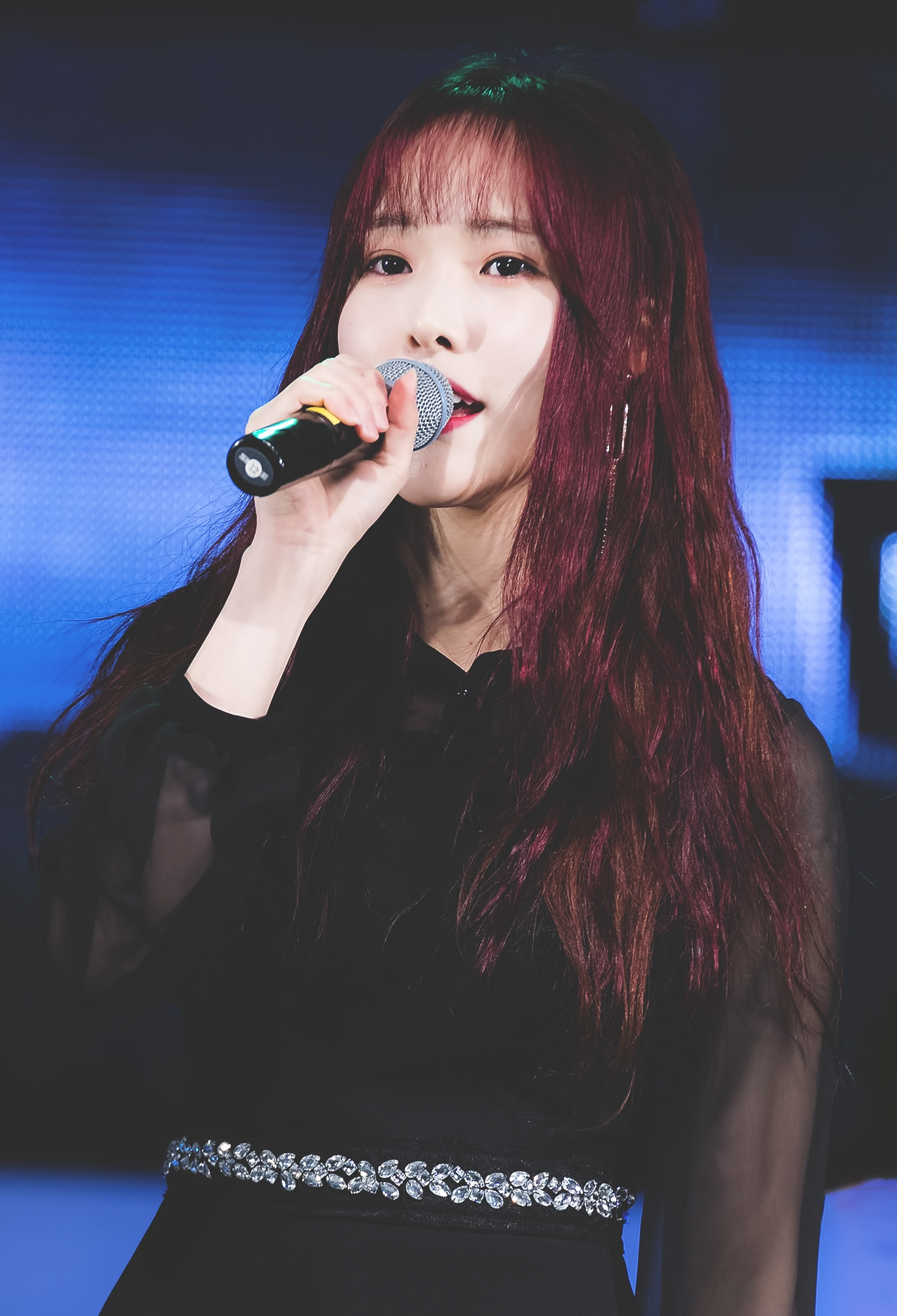 180412 고령 대가야 문화축제